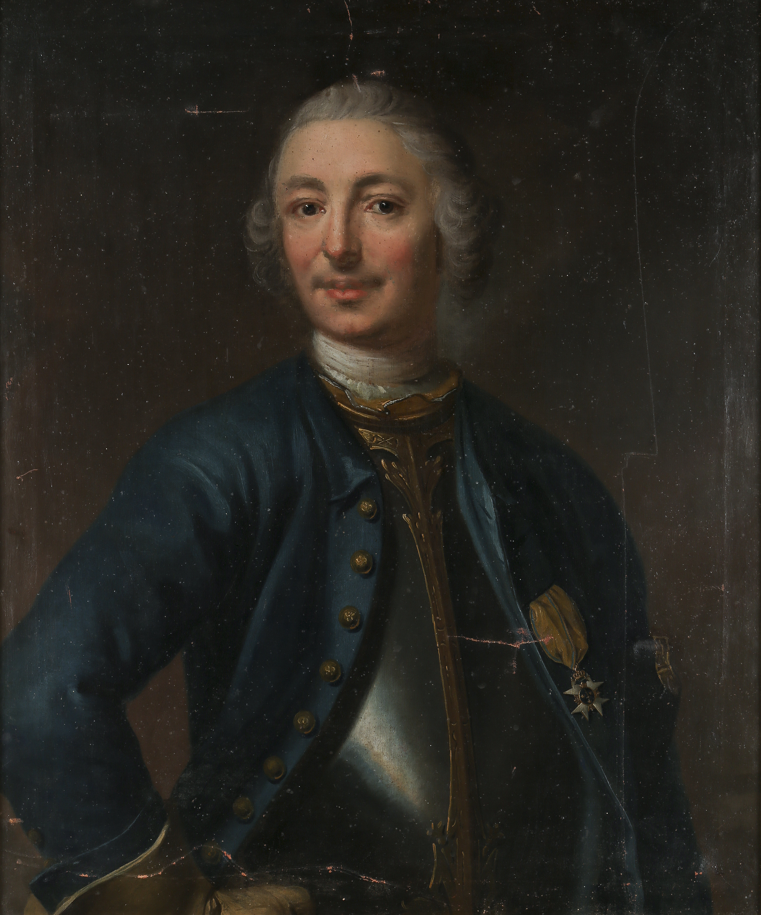 Porträtt av Didrik Henning Meijendorff von Yxkull (1697-1763) iklädd uniform för Upplands regemente. Han bär harnesk, samt Svärdsordens riddartecken på bröstet. Under armén skymtar hans tricorne. Målning från ca 1750 av Johan Henrik Scheffel. Porträttet av tidigare i samlingarna på Sörby, Närke